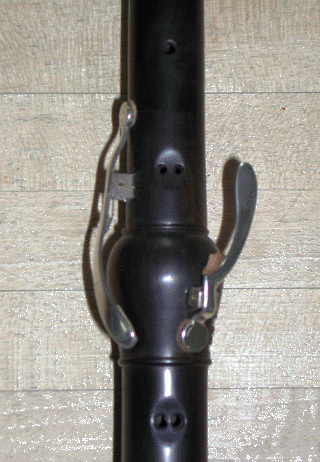 Partes del Oboe.